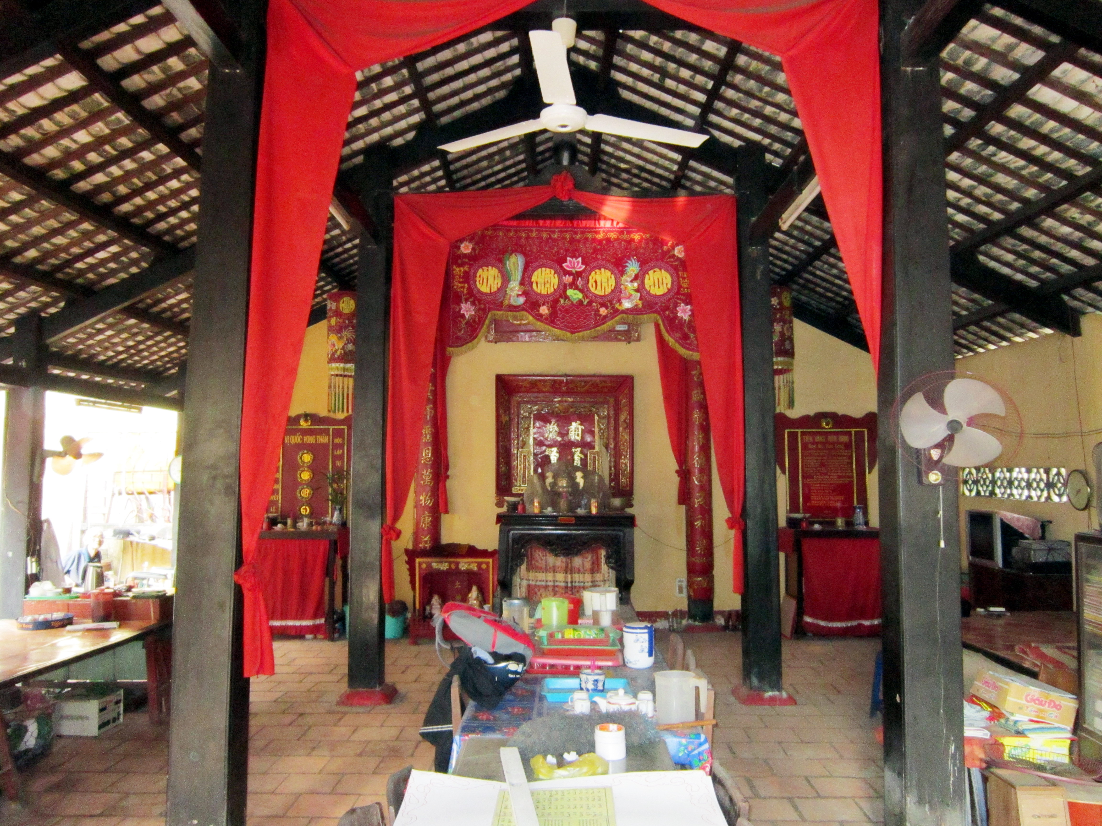 Trong nhà Túc của đình Bình Hòa, hiện tọa lạc ở số 15/77 đường Chu Văn An, thuộc phường 12, quận Bình Thạnh, Thành phố Hồ Chí Minh, Việt Nam.